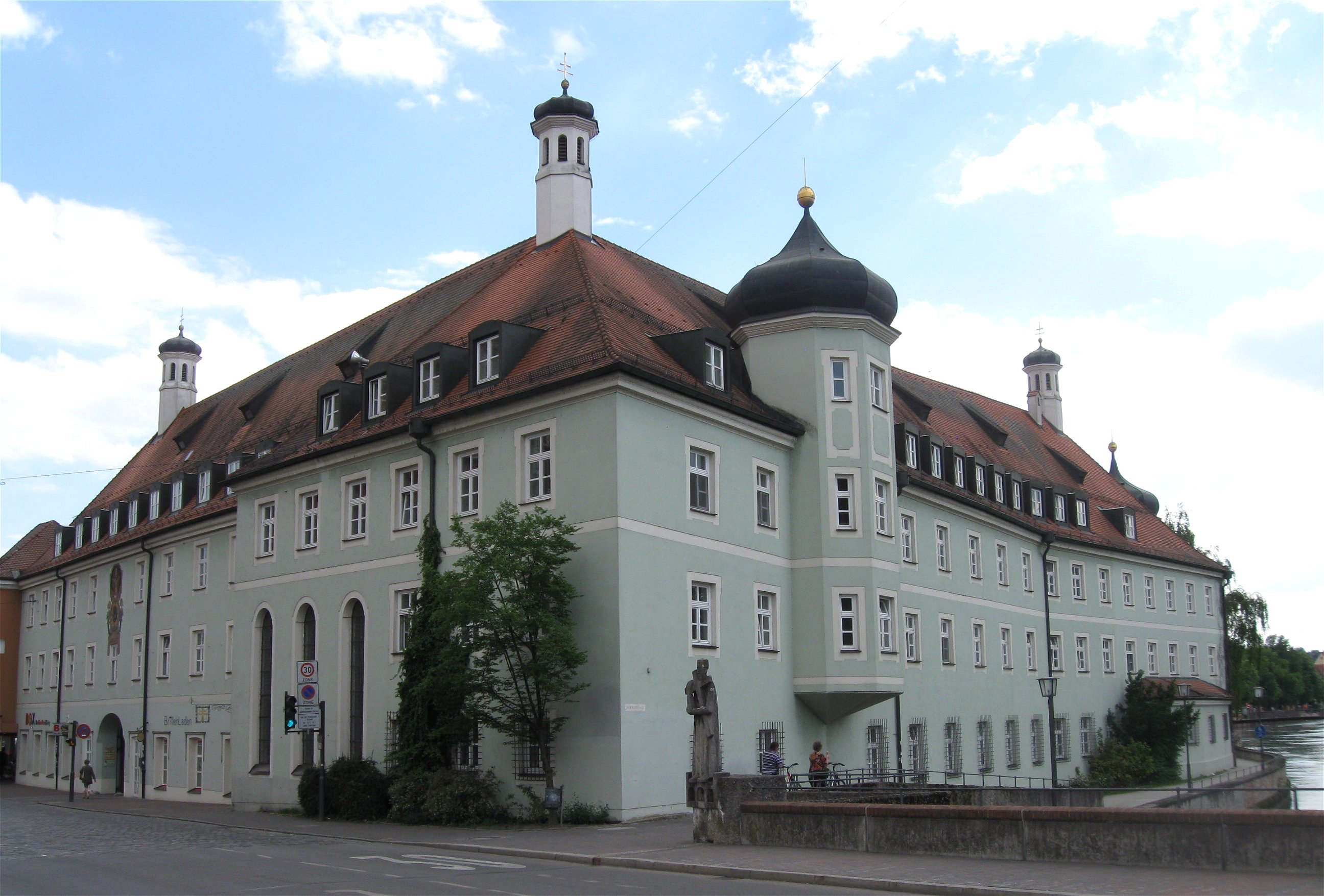 Altstadt 97; Hl.-Geist-Spital, weitläufiger dreigeschossiger Gebäudekomplex mit Walmdach um einen geschlossenen rechteckigen Innenhof, 1208 erstmals urkundlich erwähnt, im Kern mittelalterlich, durchgreifender Umbau 1722-1728 durch die Baumeister Johann Georg Hirschstetter und Martin Ehehamb; mit Ausstattung; im Ostflügel Hauskapelle; mit Ausstattung u.a. von Wenzel und Christian Jorhan; im Westflügel sog. "Krankenkapelle", heute Aussegnungsraum; mit Ausstattung; ehem. Scheune und Stallungen hinter der Vierflügelanlage liegend, wohl 2. H. 19. Jahrhundert. D-2-61-000-78